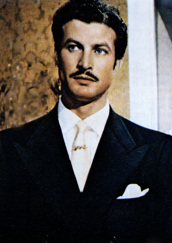 Erno Crisa